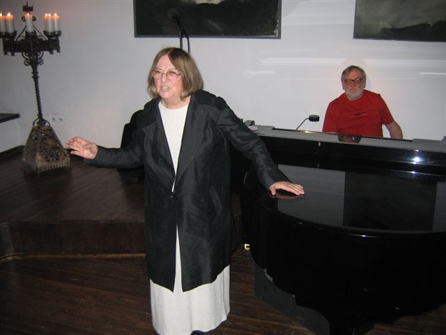 Andzrej Kurylewicz (1932-2007), Polish composer and Wanda Warska, Polish singer